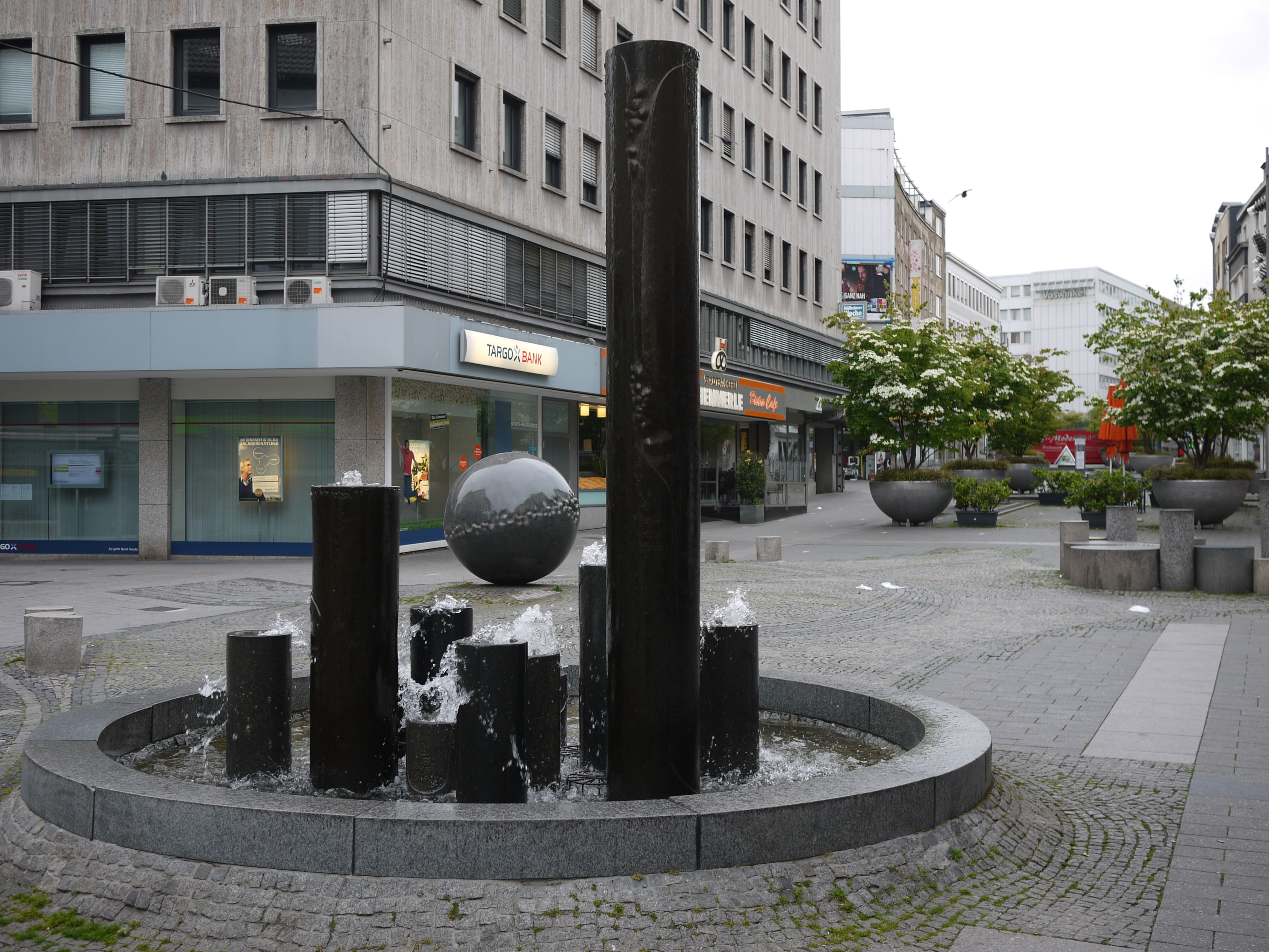 Brunnenskulptur ohne Titel, Schloßstraße, Mülheim an der Ruhr